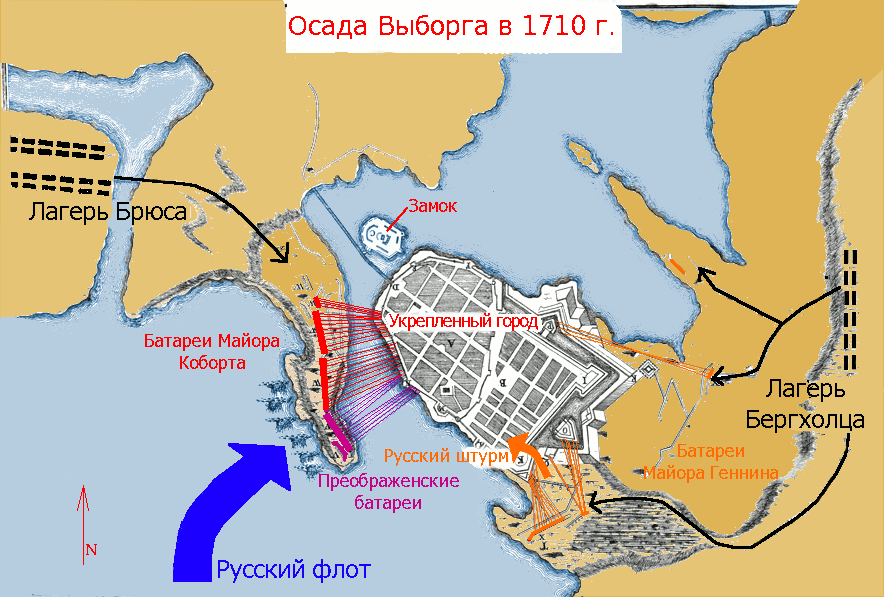 Карта показывающая осаду Выборга (1710).